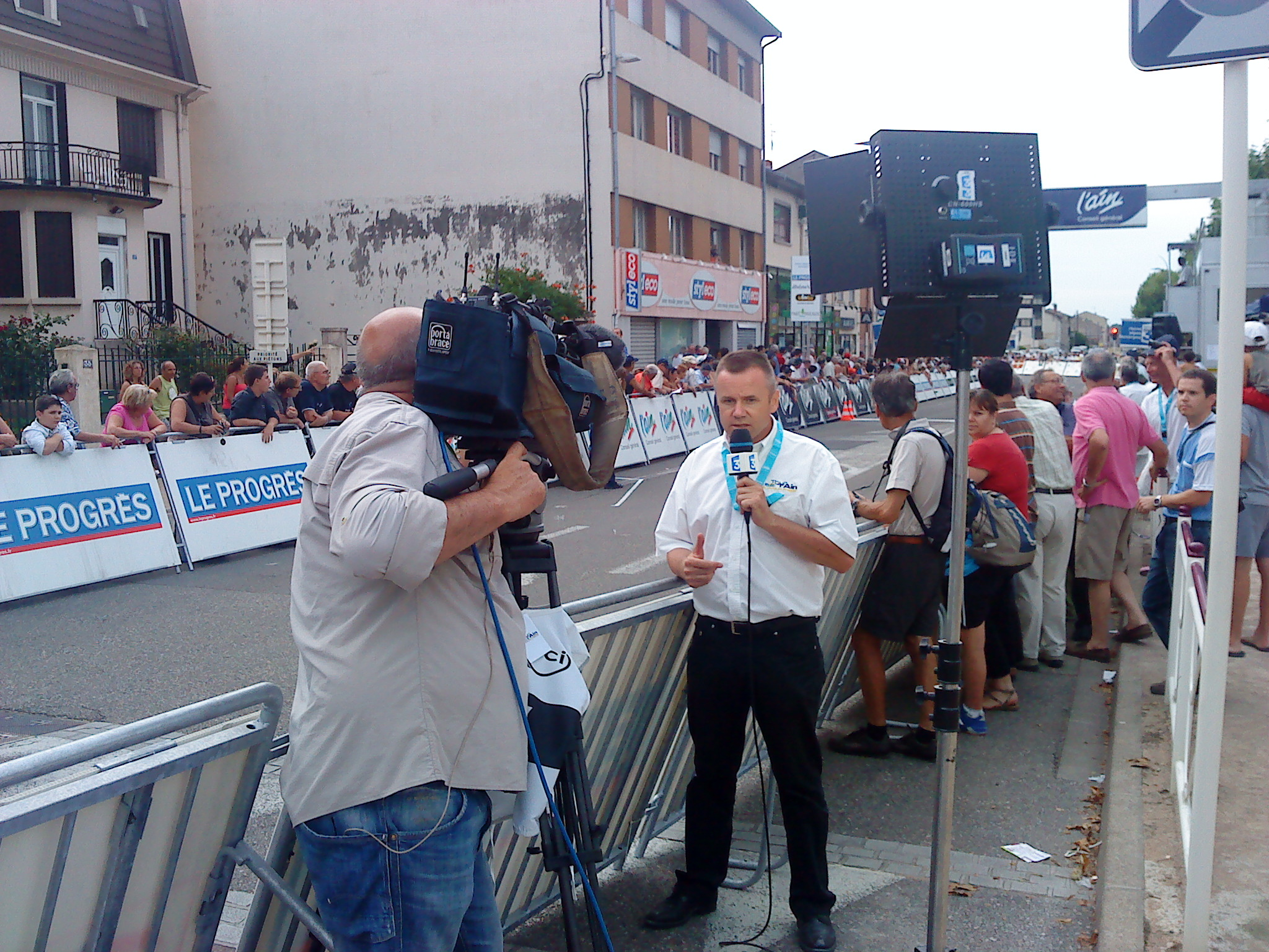 Interview du directeur du Tour de l'Ain à Ambérieu-en-Bugey